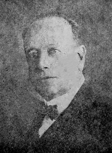 Alberto Cabero Díaz (Santiago, 20 de marzo de 1874 - ibídem, 13 de octubre de 1955) fue un abogado y político radical chileno.